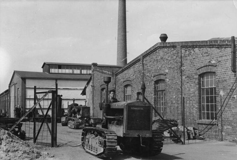 ADN-ZB/Illus-Heinscher Die Fahrzeugbauwerke Schönebeck/Elbe arbeiten nach ihrem Wiederaufbau landwirtschaftliche Raupenschlepper, die der Landwirtschaft der gesamten Ostzone zugute kommen. In der Hauptsache werden Reparaturen ausgeführt. UBz: Ein überholter Raupenschlepper verlässt einsatzbereit für schwerste Landarbeit das Werk. Herausgabe: 28.5.1948, 1559-48